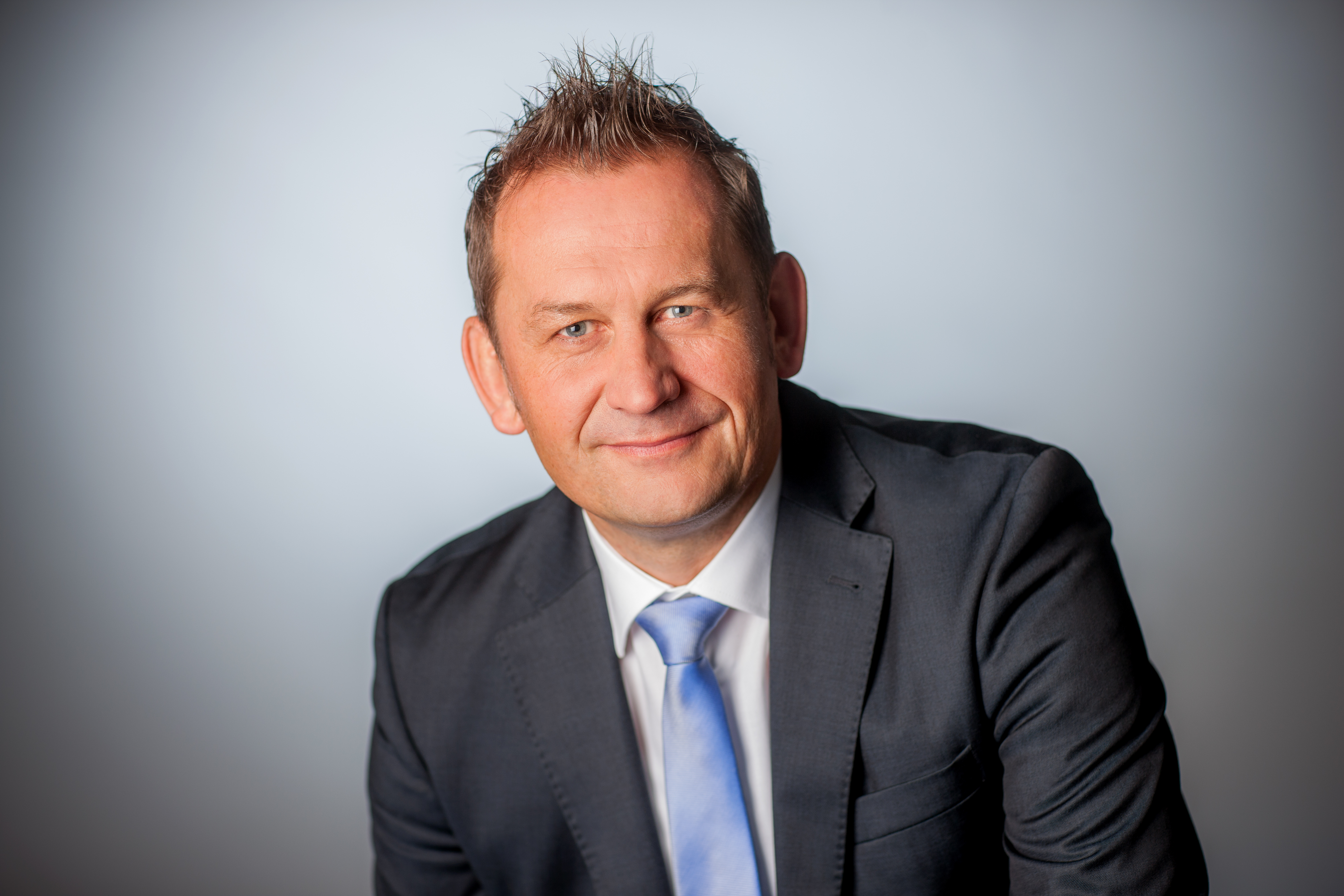 Dietmar Panske MdL